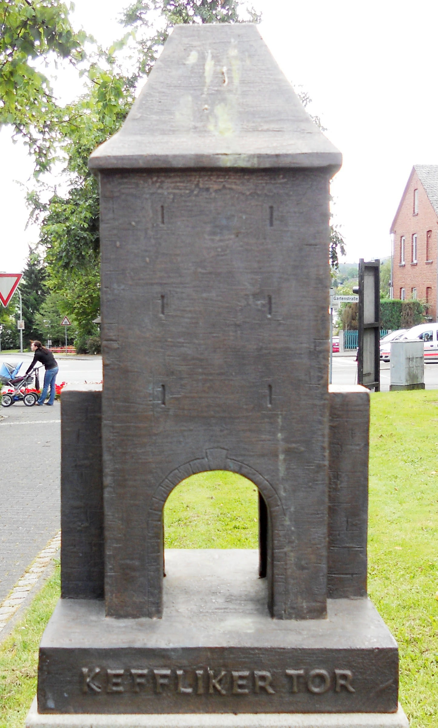 Keffliker Tor Nachbildung